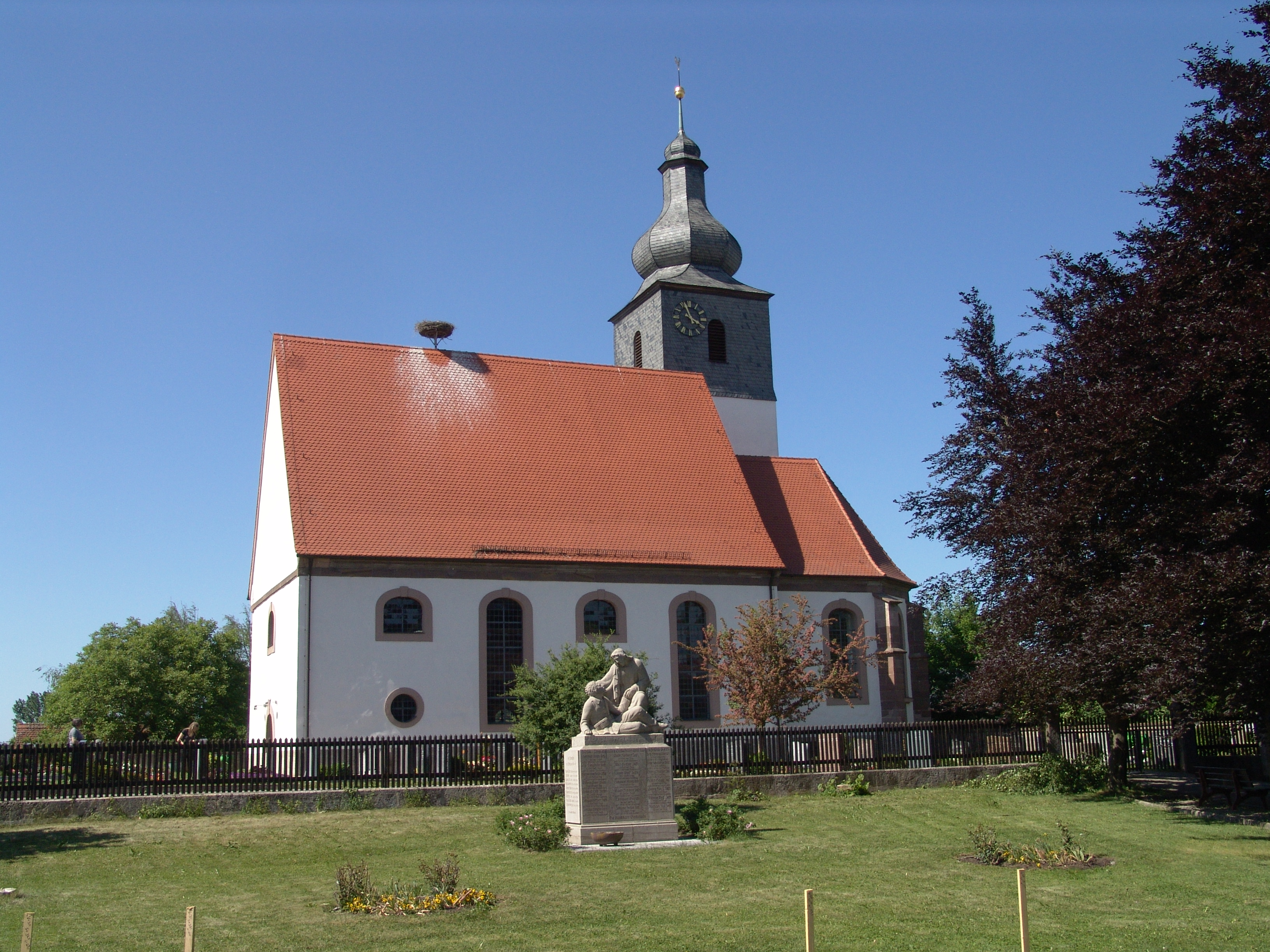 evang.-luth. Kirche Zur Heiligen Dreifaltigkeit in Lenkersheim